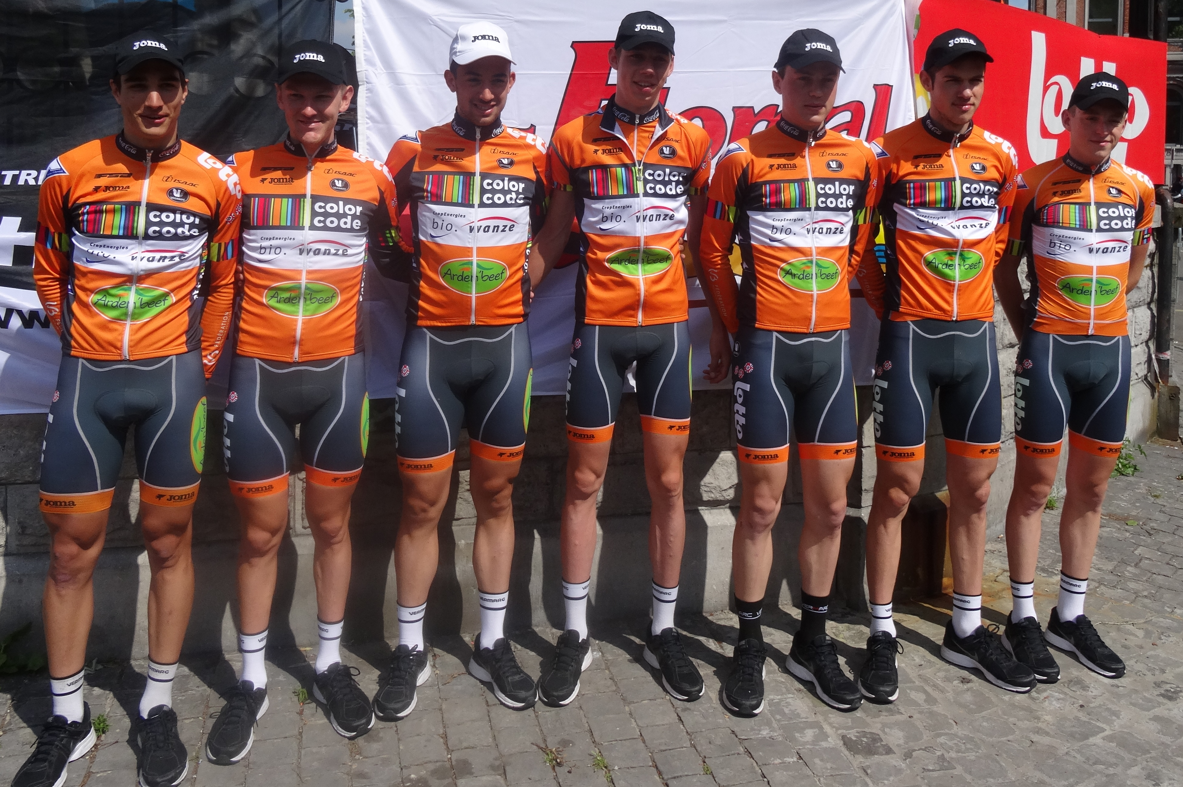 Reportage réalisé le samedi 17 mai à l'occasion du départ du Grand Prix Criquielion 2014 à Boussu, Belgique.